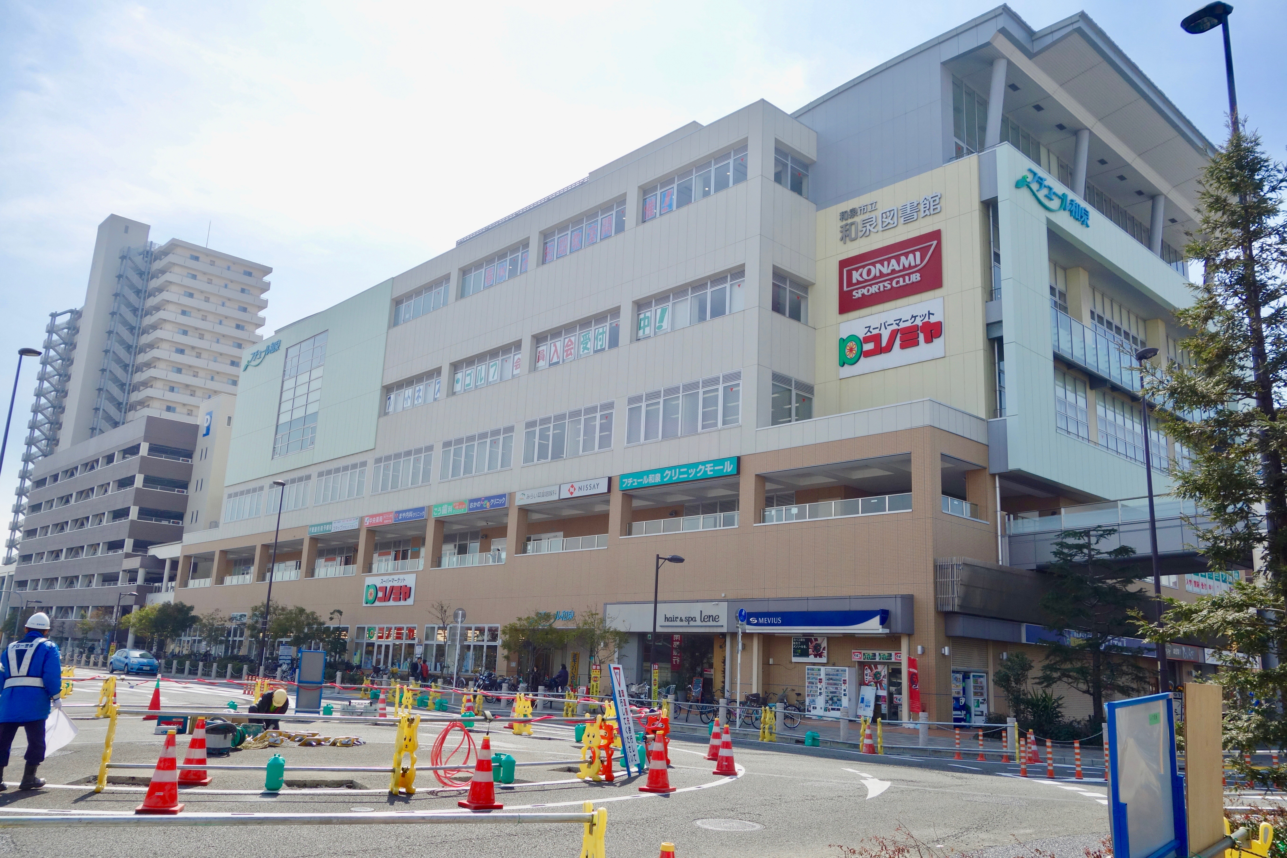 フチュール和泉